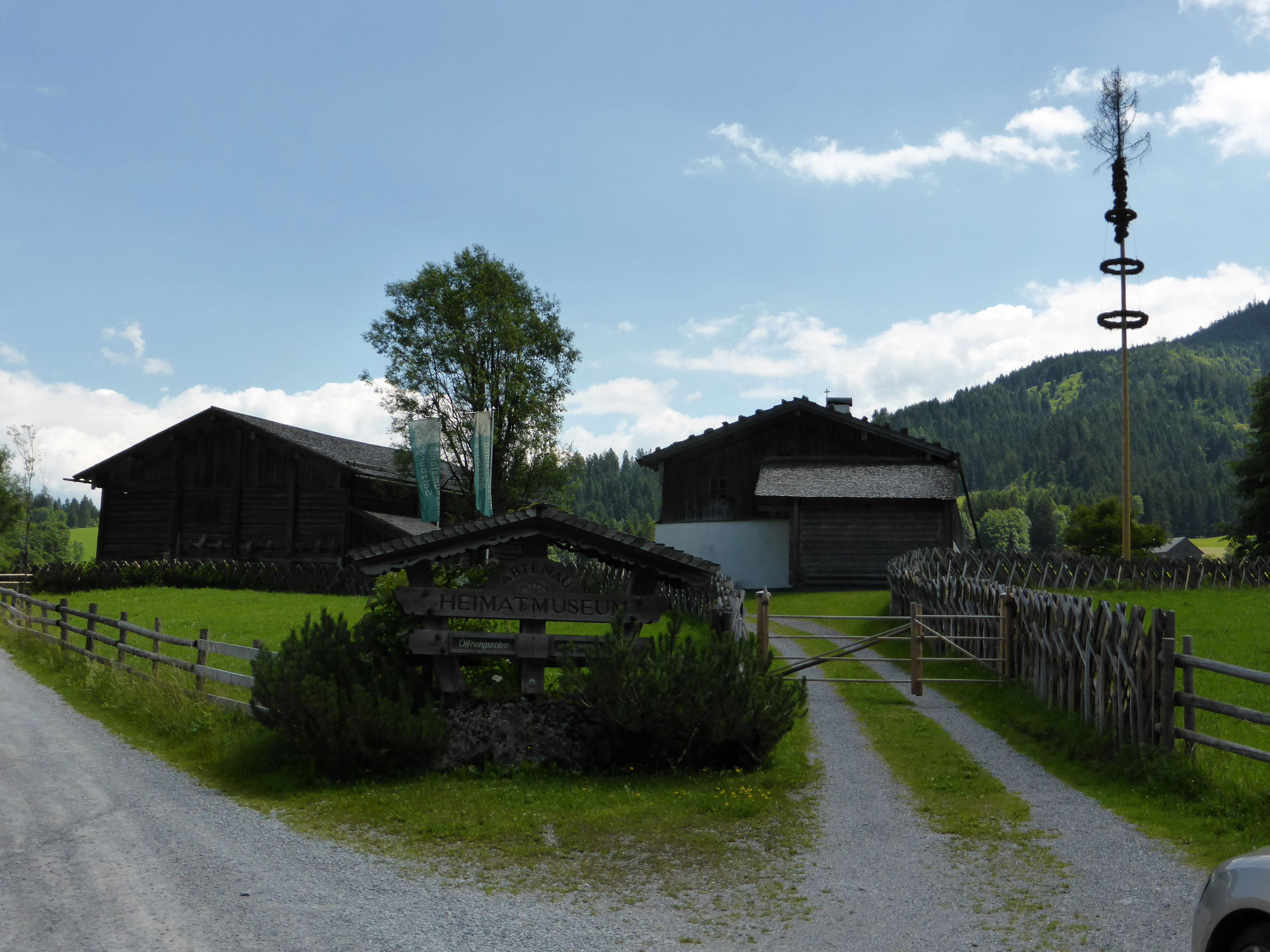 Bauernhof (Anlage) Arlergut